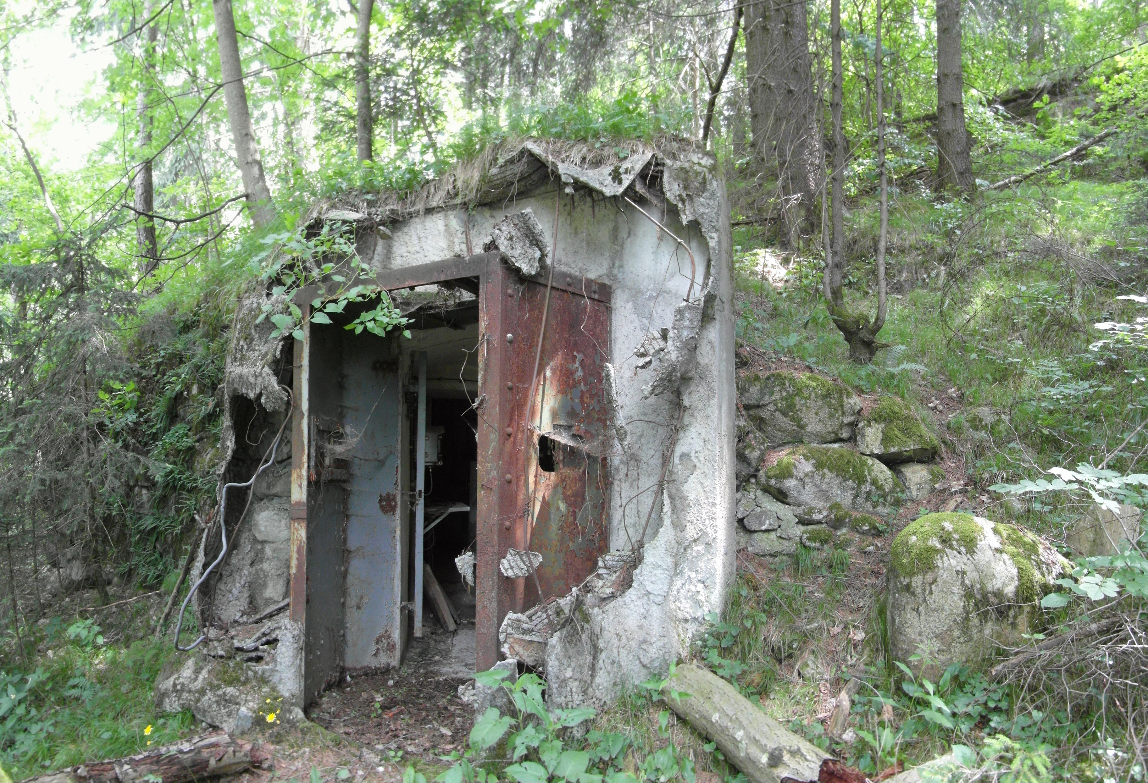 Ingresso opera 3, sbarramento Chiusa di Rio